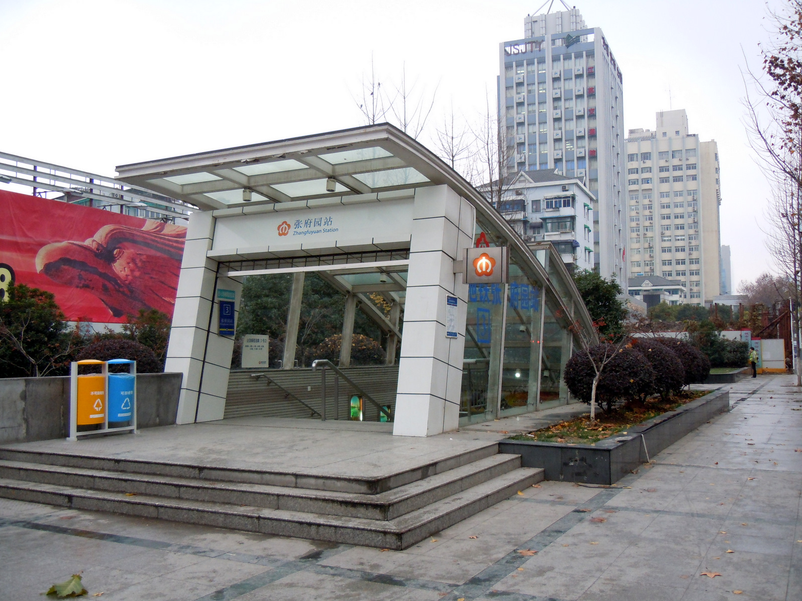 南京地铁张府园站出口